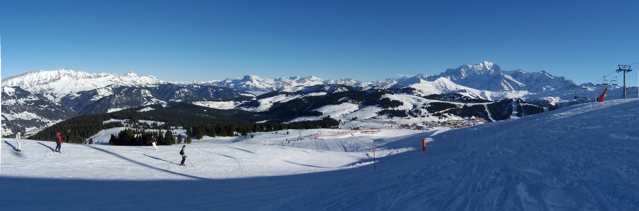 Vue du mont Bisanne sur les Saisies